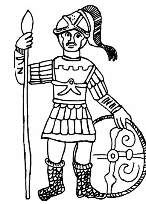 Skizze der Darstellung eines gallo-romanischen Soldaten des 6. Jahrhunderts n.Chr. auf einer alamanischen Silberplatte des 7. Jahrhunderts n.Chr im Musée Archeologique, Straßbourg.